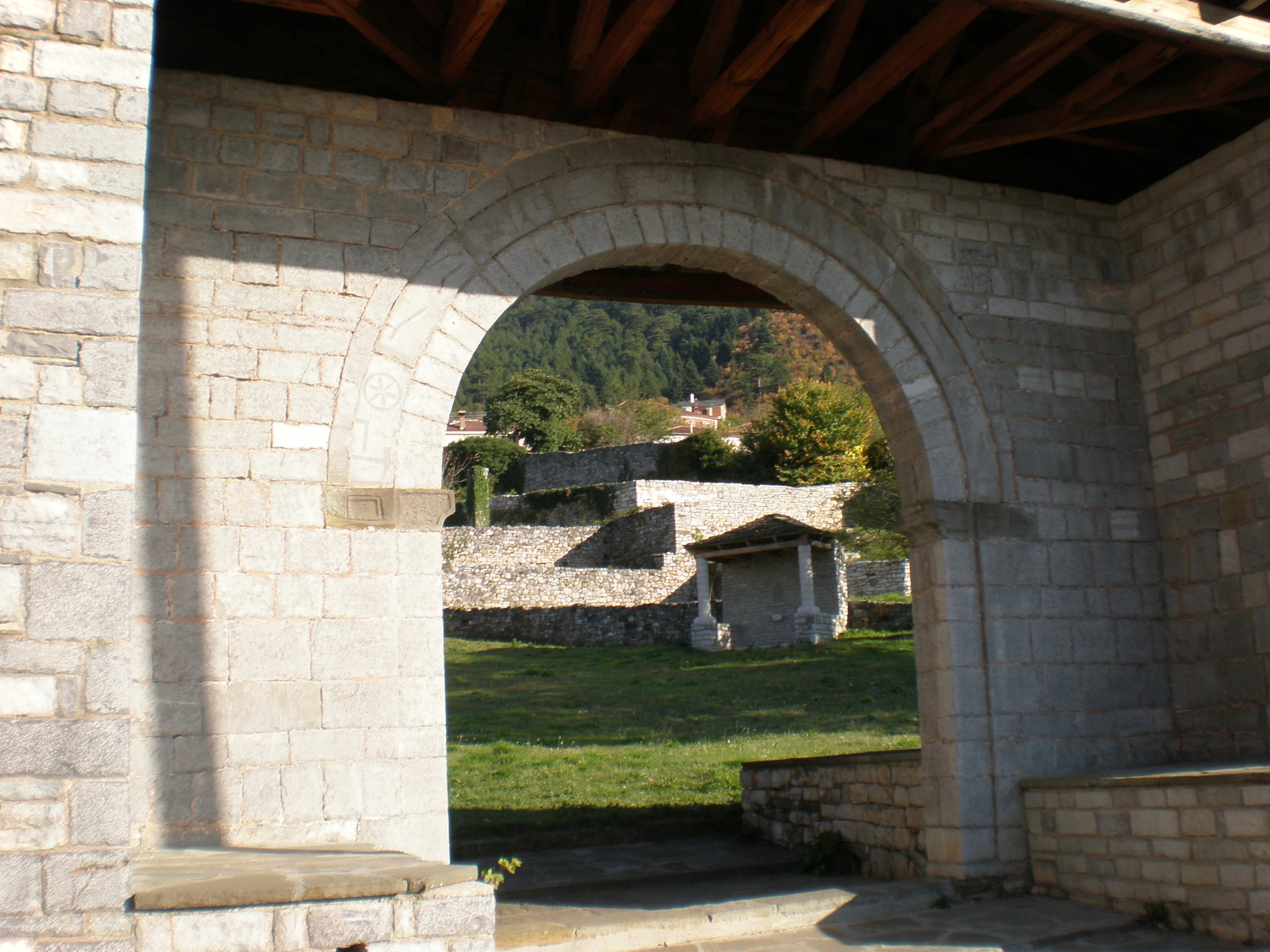 Η είσοδος από το σπίτι της Χάμκως στην Κόνιτσα